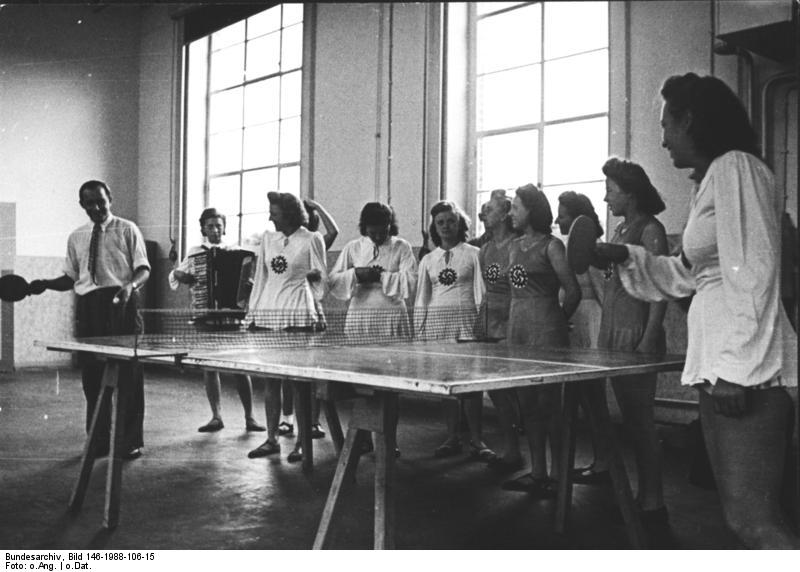 KdF-Betriebssport in der Werkseigenen Turnhalle